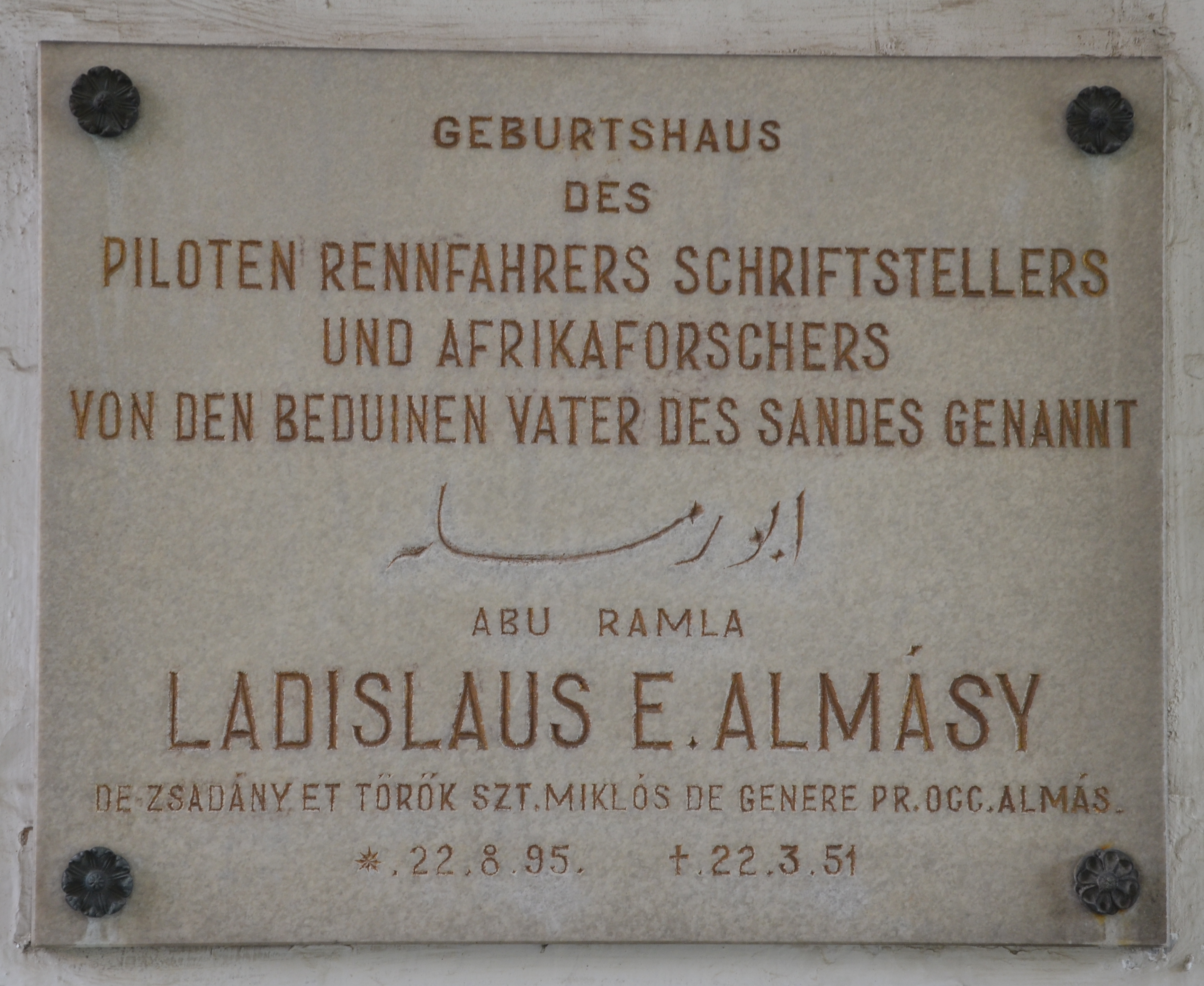 Az emléktábla a vár kaputornya alatt látható.